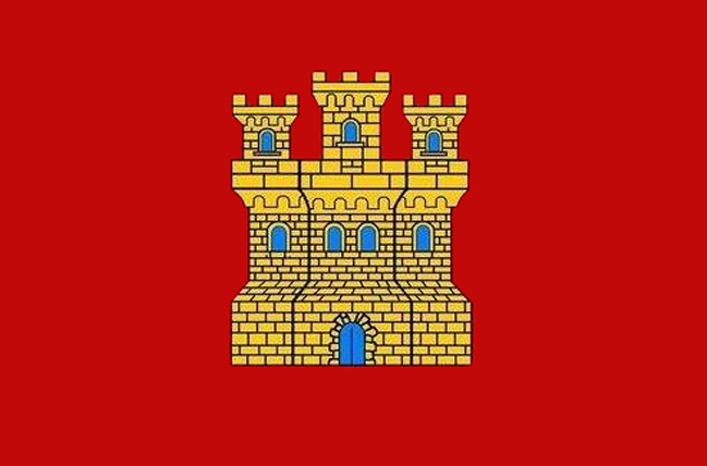 Bandera roja carmesí empleada por la asociación Comunidad Castellana durante la Transición Española (1976-1983)